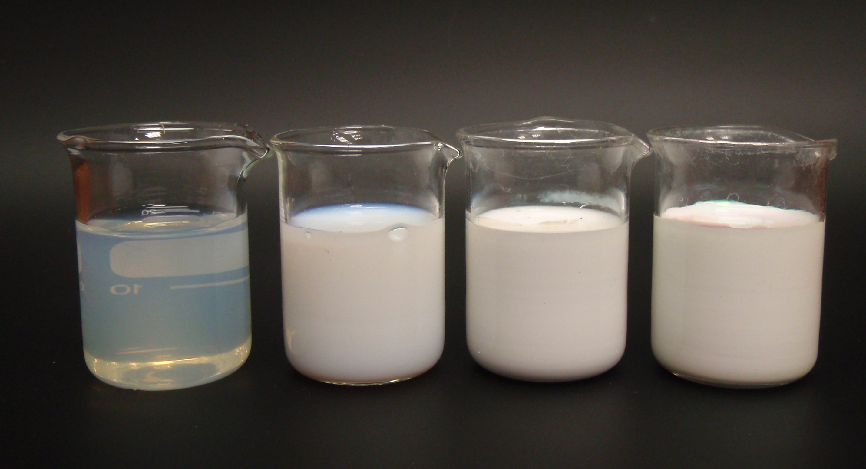 vier Polymerdispersionen mit unterschiedlichen Teilchendurchmessern (von links nach rechts): 50 nm, 100 nm, 200 nm, ca. 160 nm monodispers. Festkörper links 40 %, Rest 50 %.